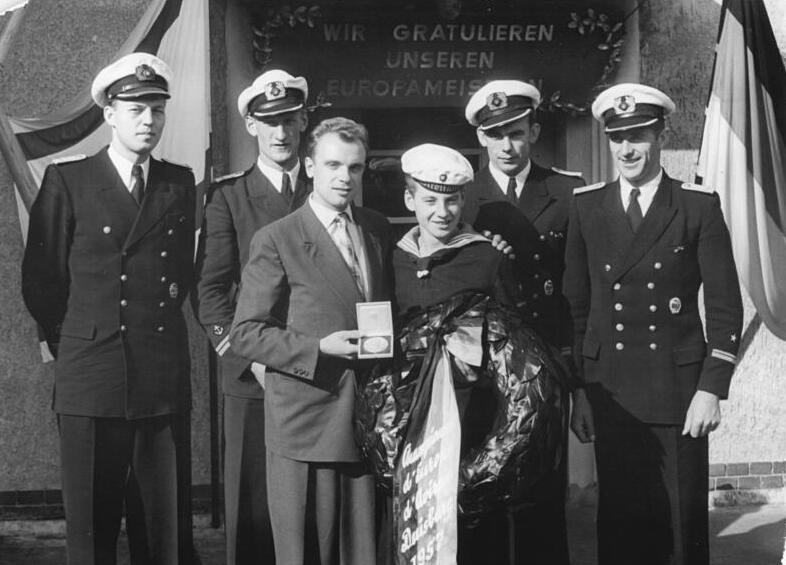 Ruderer, DDR, Europameister im Vierer Zentralbild Pinske 3.9.1957 Europameister Vorwärts in Berlin Die Ruderer der DDR, die an den Europameisterschaften in Duisburg teilnahmen, sind wieder zurückgekehrt. Am Dienstag, dem 3.9.1957, fand auf dem Bootsgelände des ASK Vorwärts Berlin für die Europameister im Vierer mit Steuermann eine Ehrung statt. UBz: Die Europameister vor ihrem Bootshaus in Berlin-Grünau. Wir erkennen von links nach rechts: Wundratsch, Dathe, Trainer Sternkopf, Steuermann Donnick, Müller und Meyer.